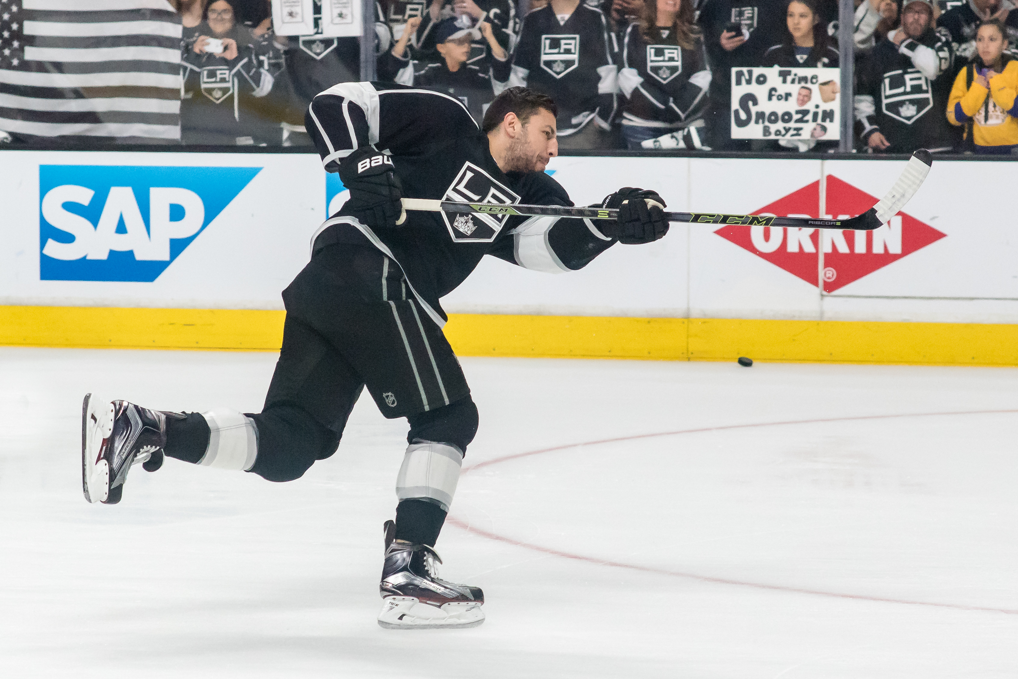 Milan Lucic